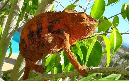 Caméléon léopard (Furcifer pardalis) femelle dans un jardin de St Paul, Ile de La Réunion